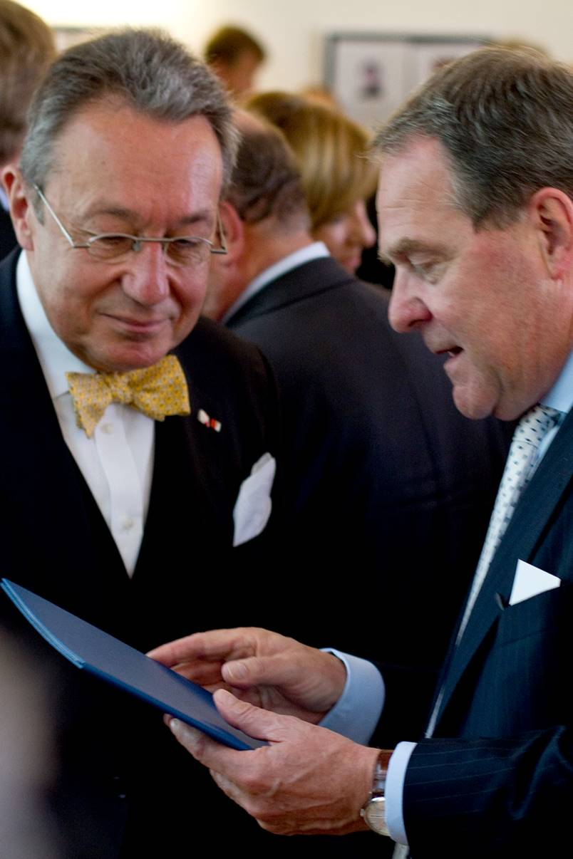 Der ehemalige Direktor Prof. Dr. Bernd Goldmann, hier mit Minister Heubisch a.D., beim Amtsantritt seiner Nachfolgerin Nora-Eugenie Gomringer im April 2010